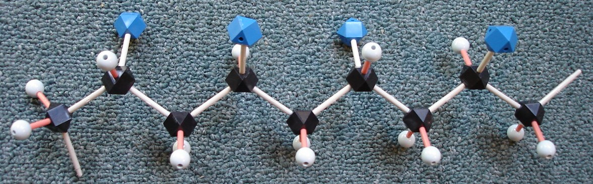 Polímero sindiotáctico representado por modelo de química